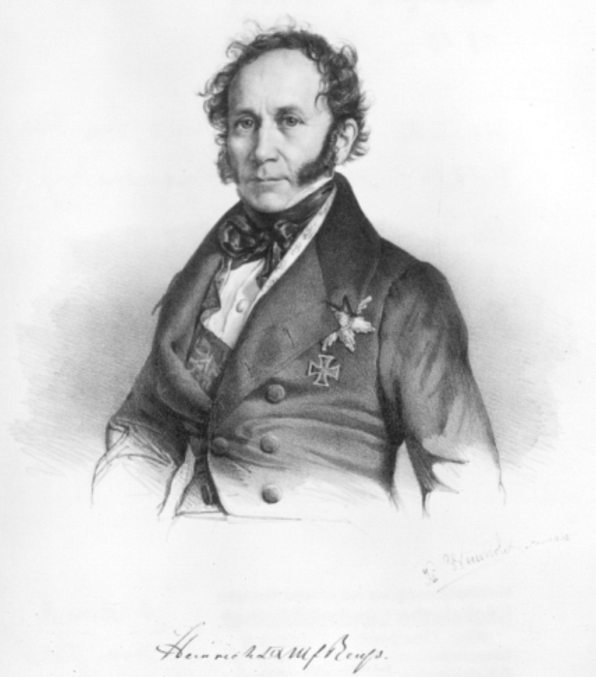 Heinrich LXIII. Fürst Reuß zu Schleiz-Köstritz (* 18. Juni 1786 in Berlin; † 27. September 1841 in Stonsdorf)